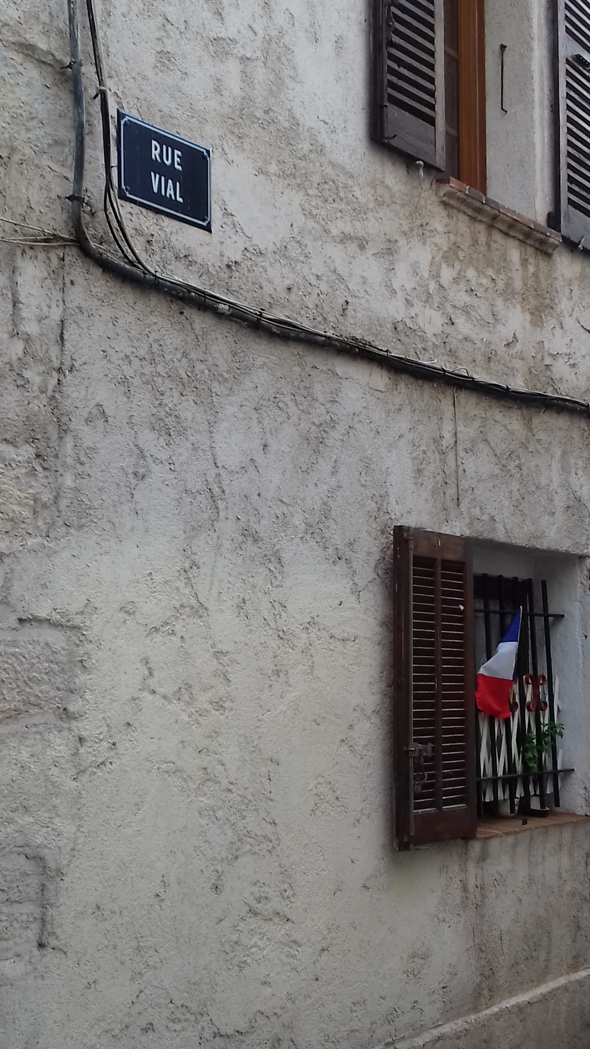 dans les rues d'Antibes